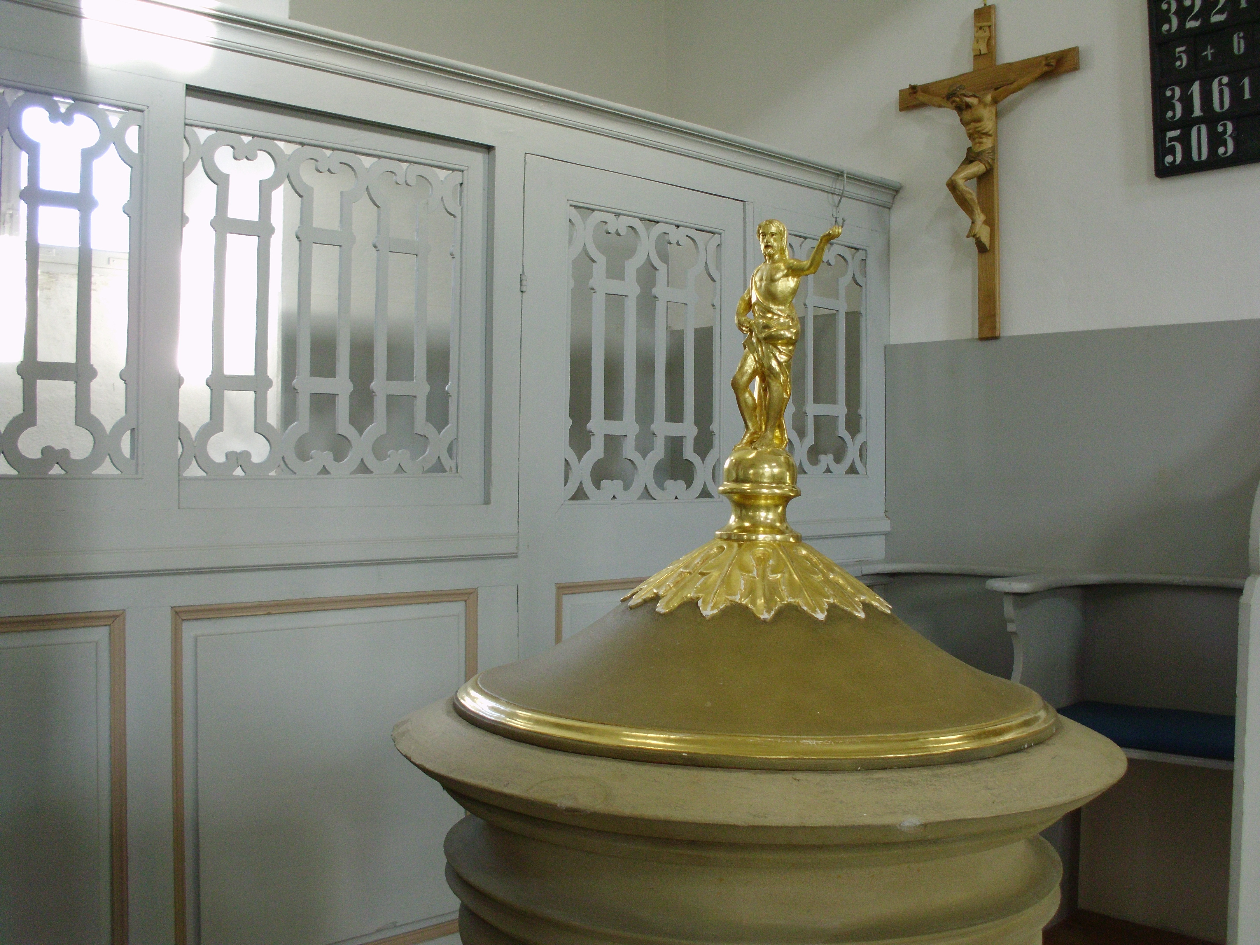 Taufstein und Patronatsloge in St. Jakob in Häslabronn, einem Ortsteil des mittelfränkischen Colmberg